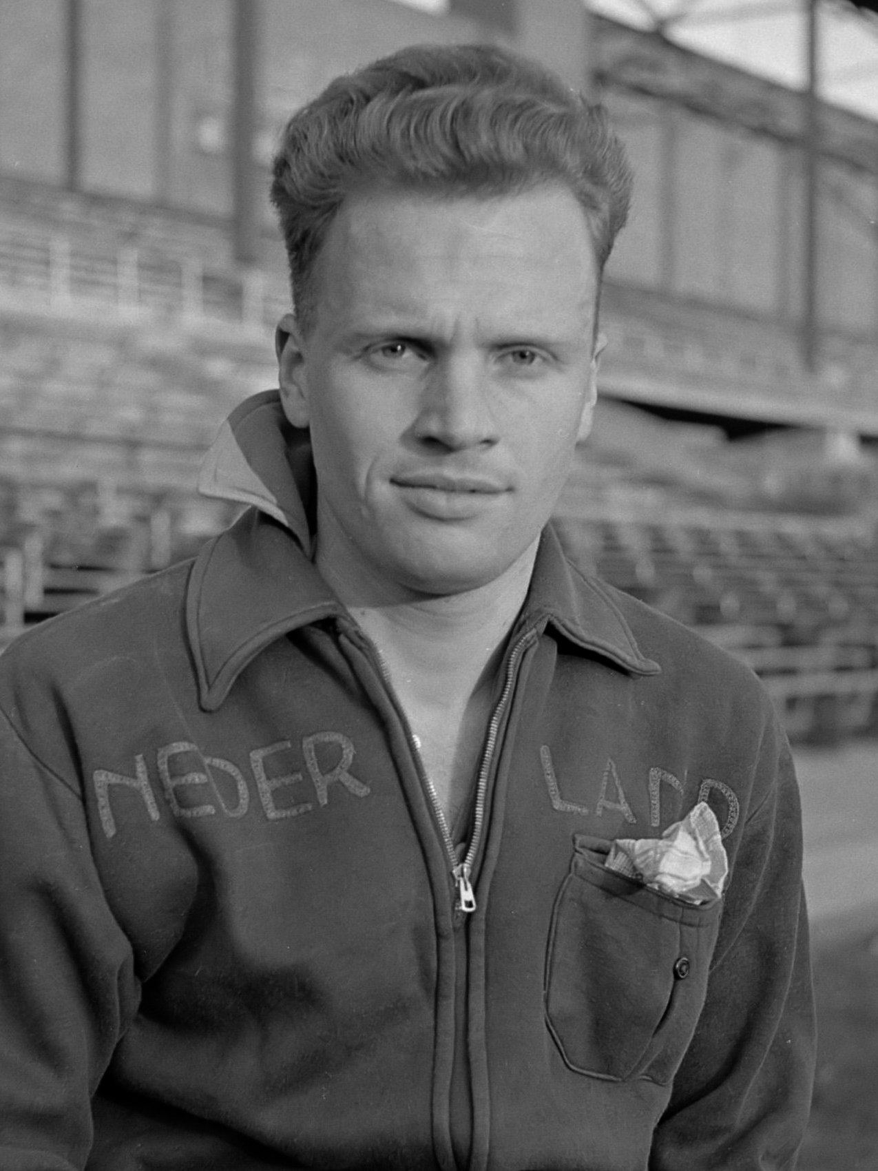 Nederlands voetbalelftal 1951. Jan van Schijndel (SVV) in het Olympisch Stadion in Amsterdam, enige dagen na de oefeninterland tegen België.